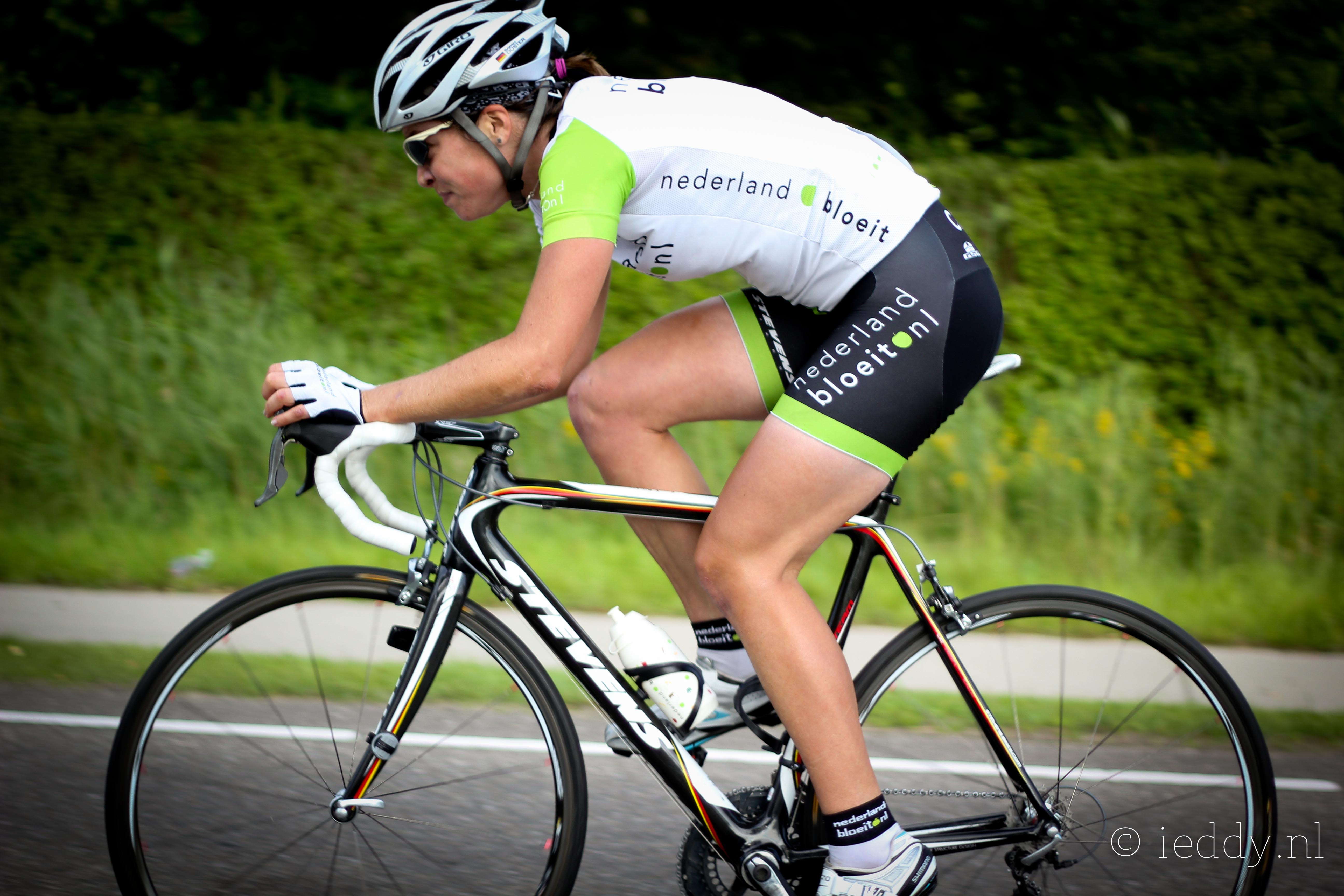 Sarah Düster Draai van de Kaai 2011